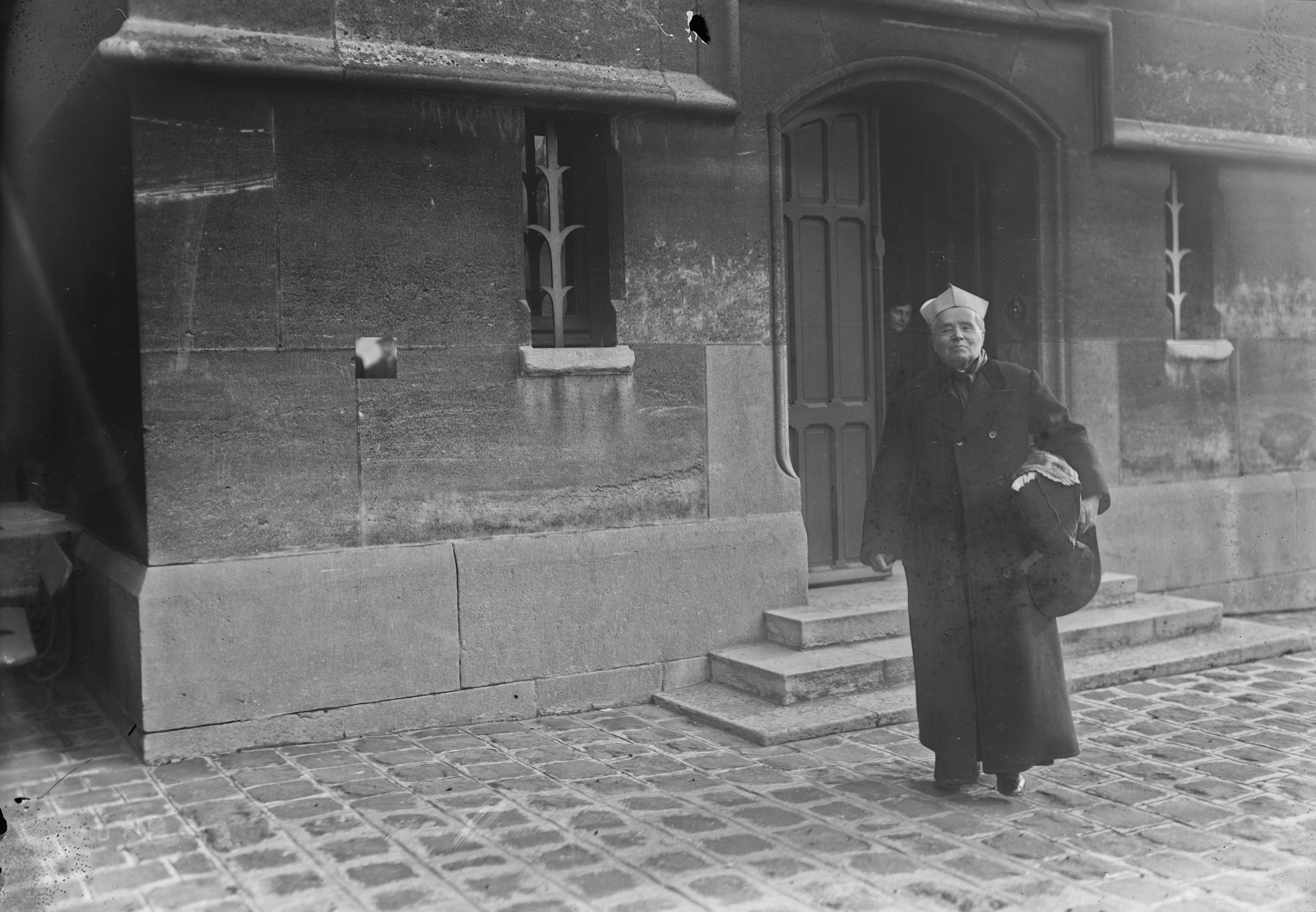 Mgr Touchet.